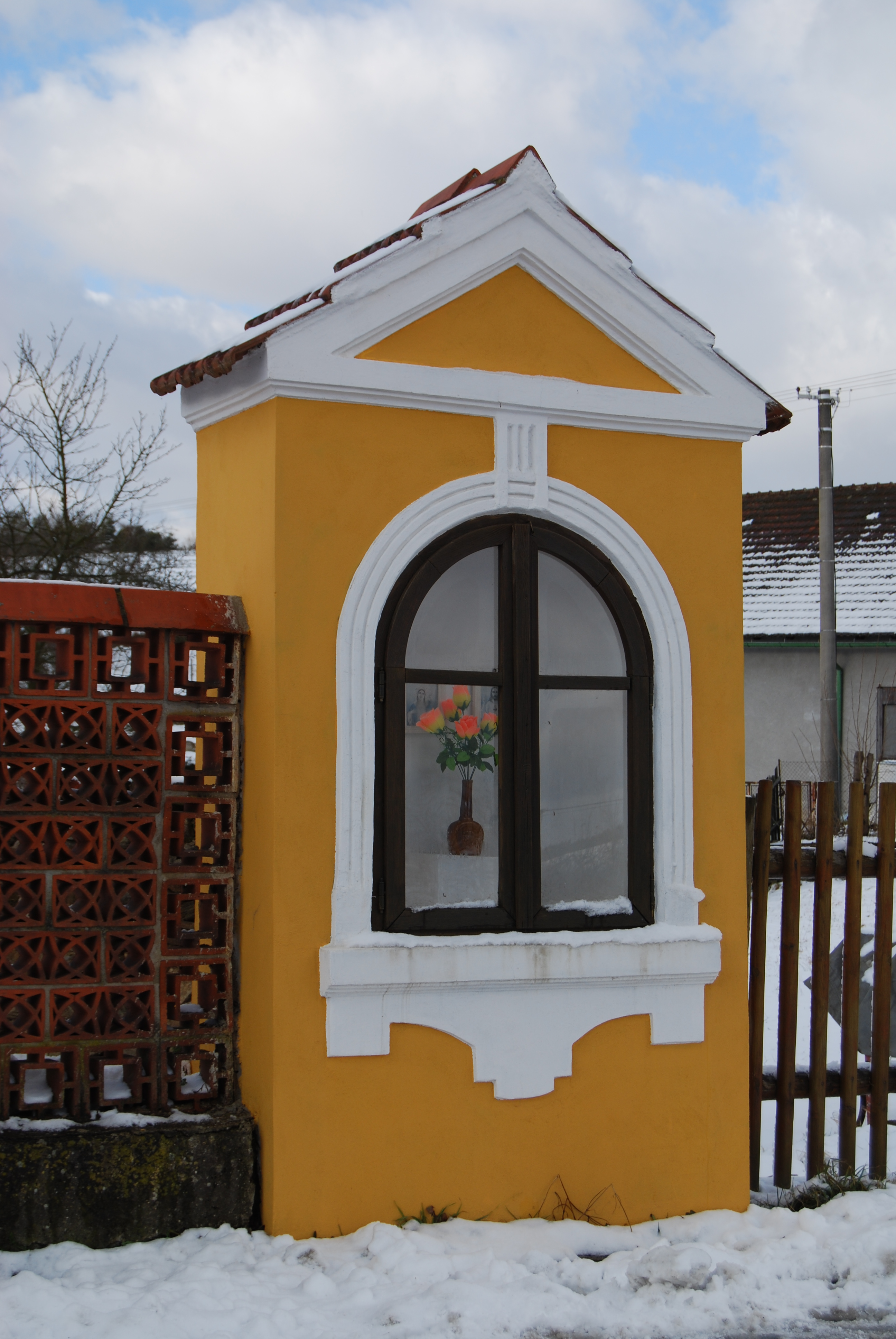 Výklenková kaple sv. Jana Nepomuckého u čp. 67 v obci. Borovany (Bernartice). Okres Písek. Česká republika.